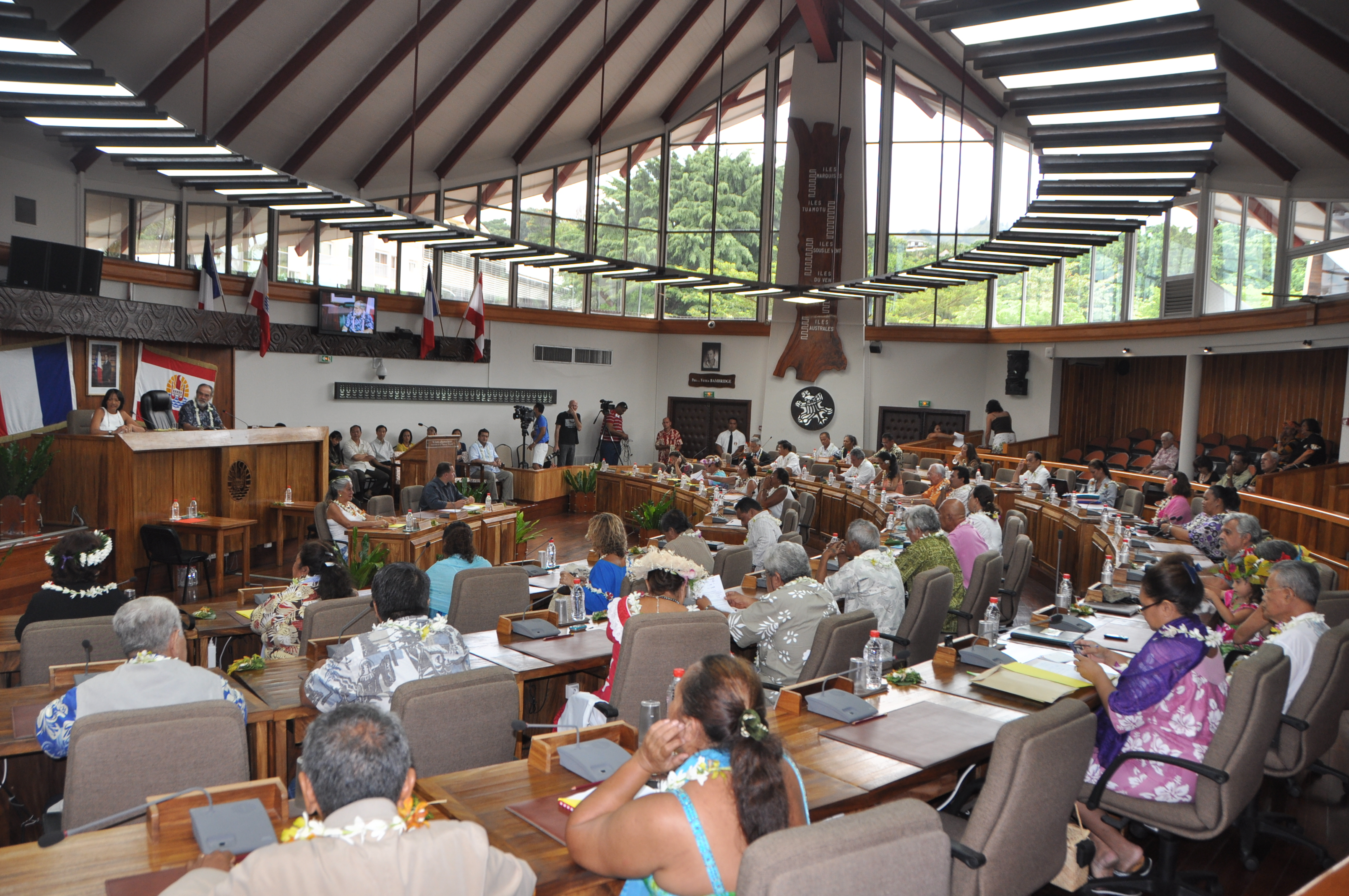 La salle (piha) Vetea BAMBRIDGE ou se tiennent les séances plénières